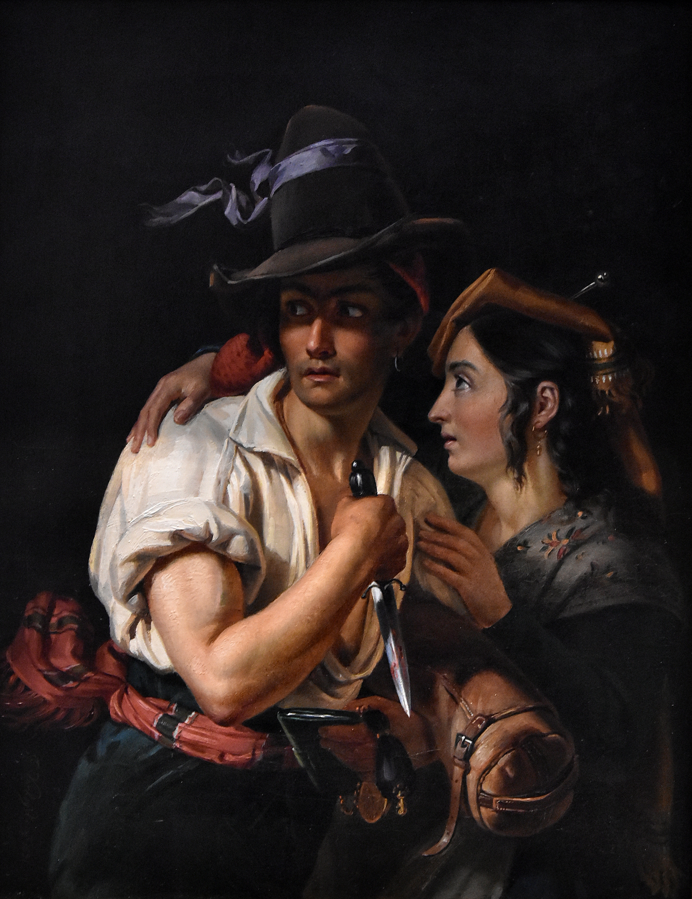 François Verheyden (1806-1889) Maquisscène - La Boverie Luik 23-08-2018 This photo of movable heritage has been taken in the Walloon Region